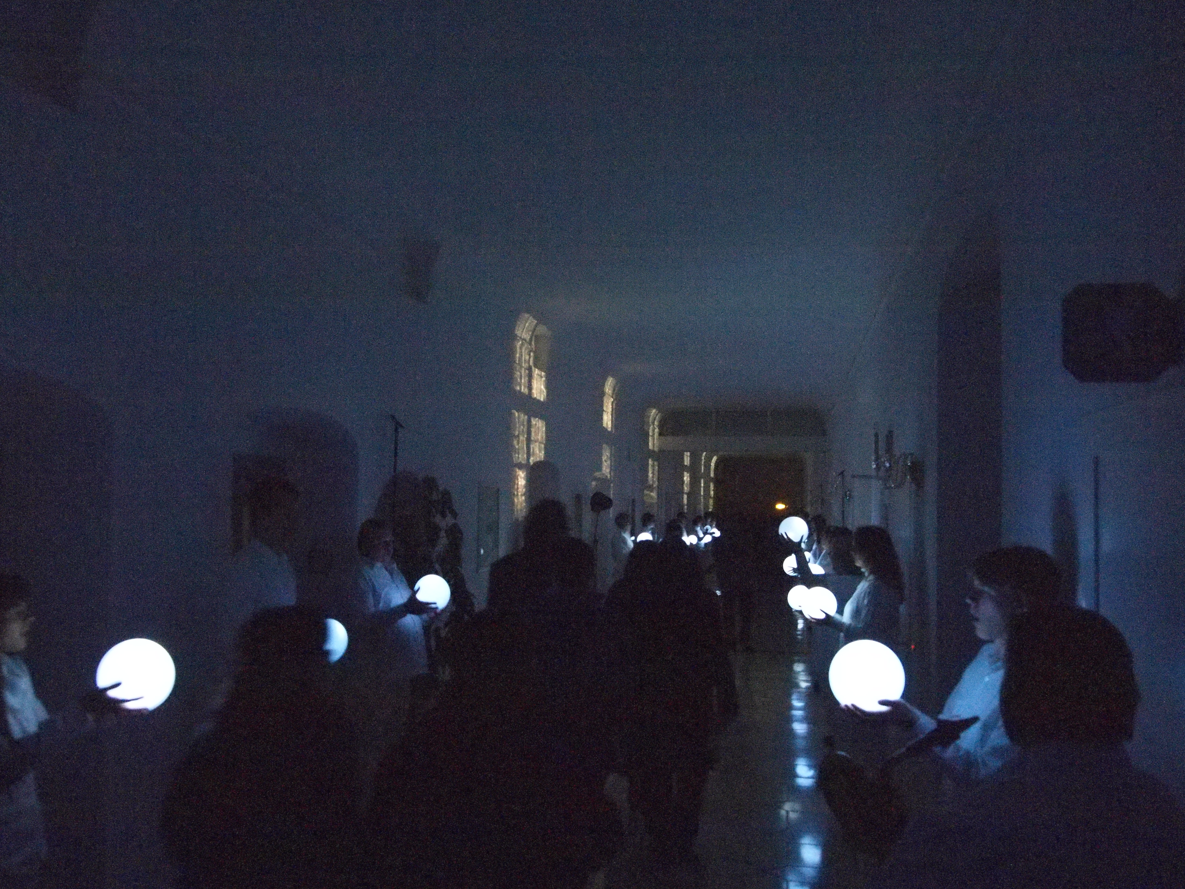 Musikfestival Tonspuren in Irsee, Eröffnungsveranstaltung 5. April 2013 - Wandelkonzert mit Chor